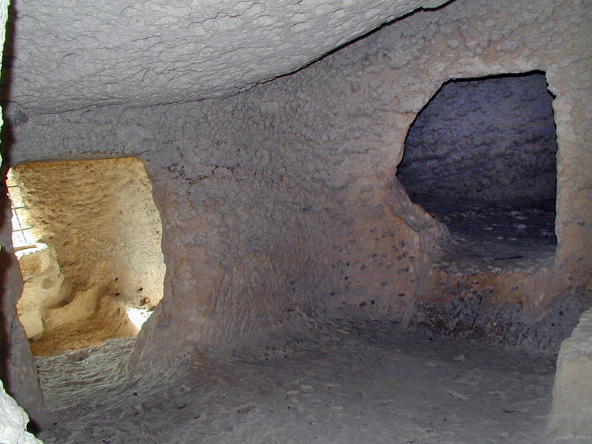 Domus di Sedini: celle interne